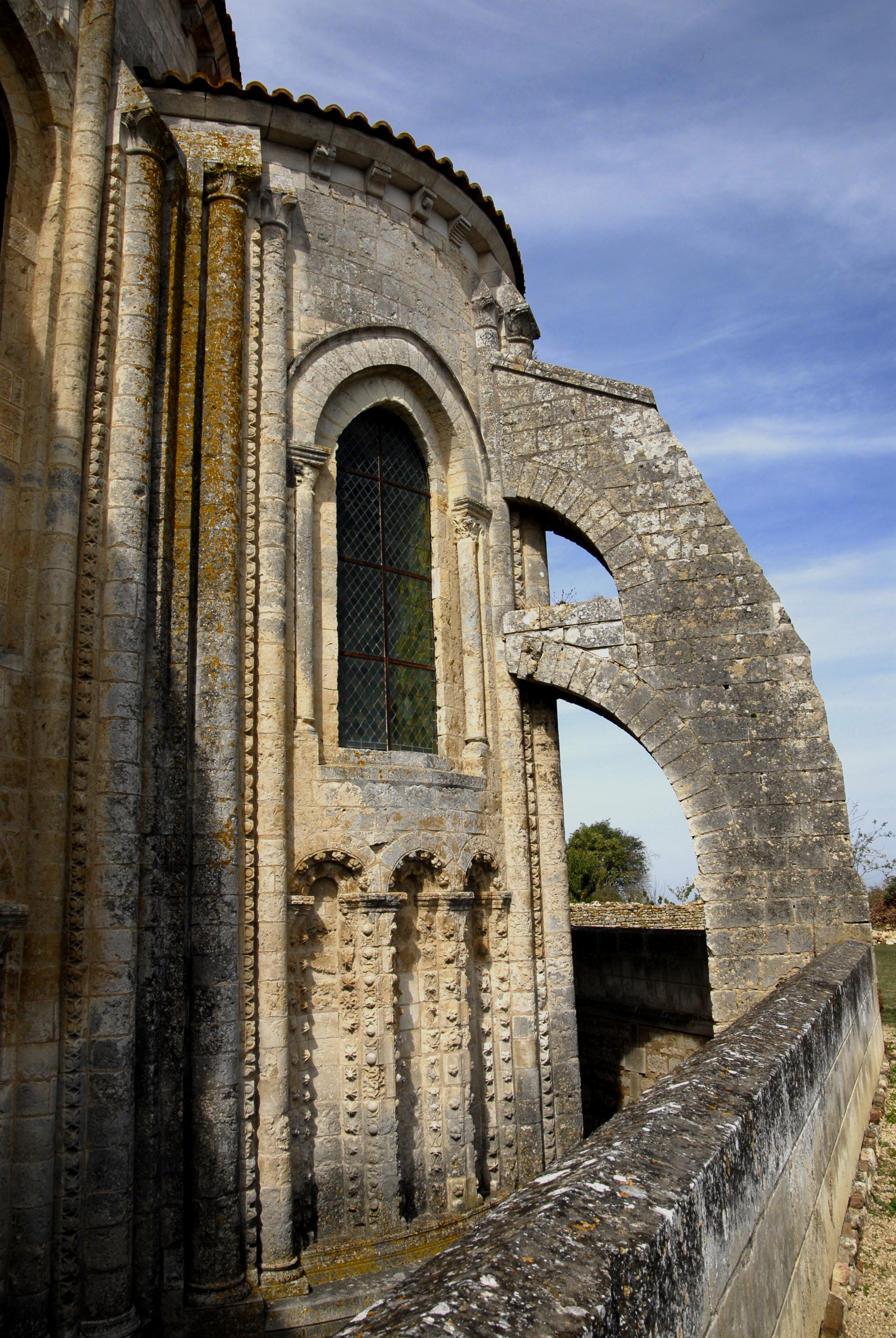 Saint-Jouin-de-Marnes, Umgangskapelle mit Strebepfeiler